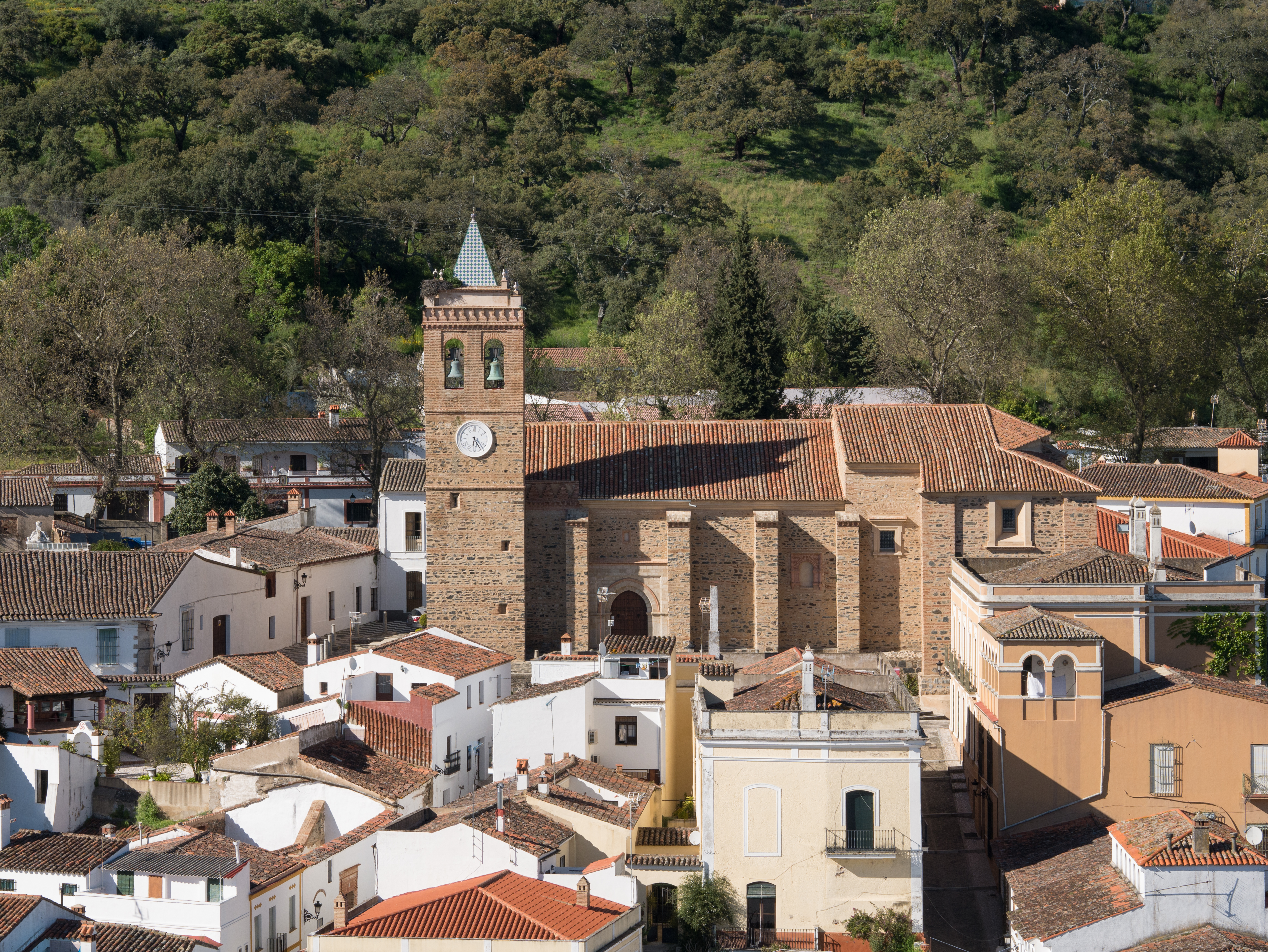 Almonaster La Real. Sierra de Aracena, Huelva, Andalucía, España